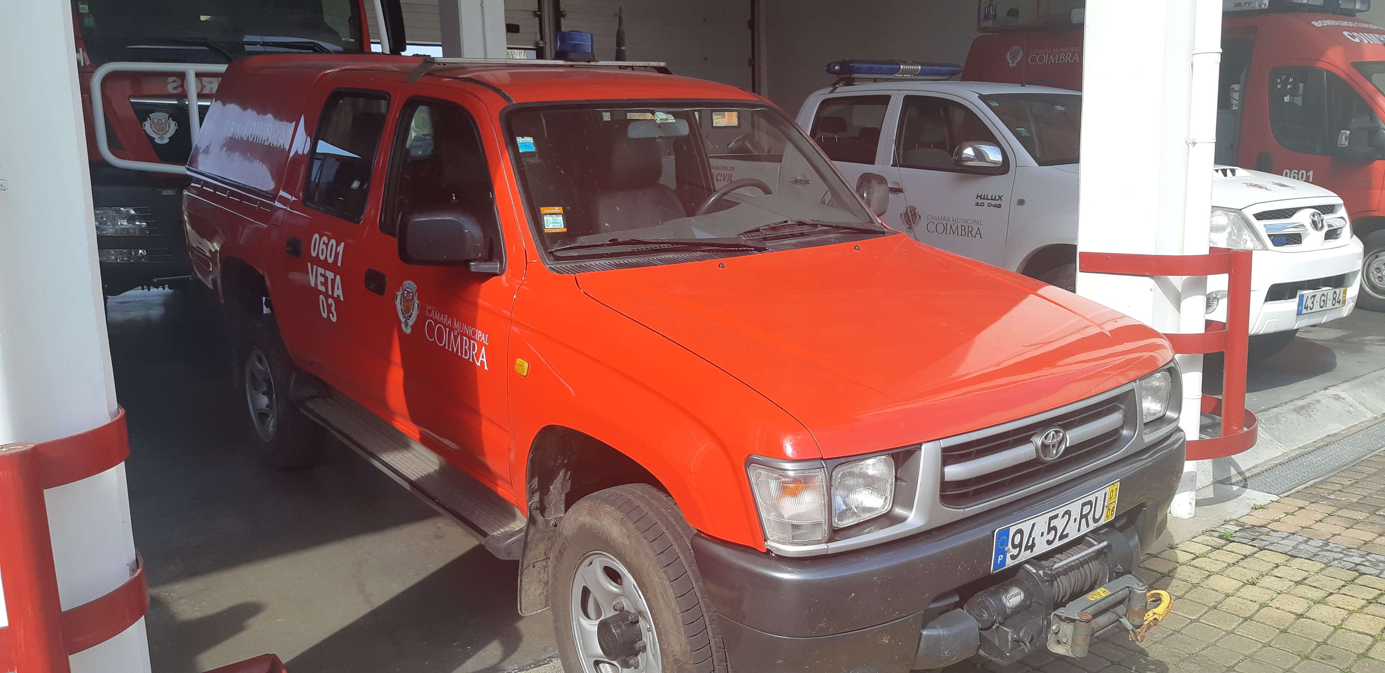 Veiculo de Apoio